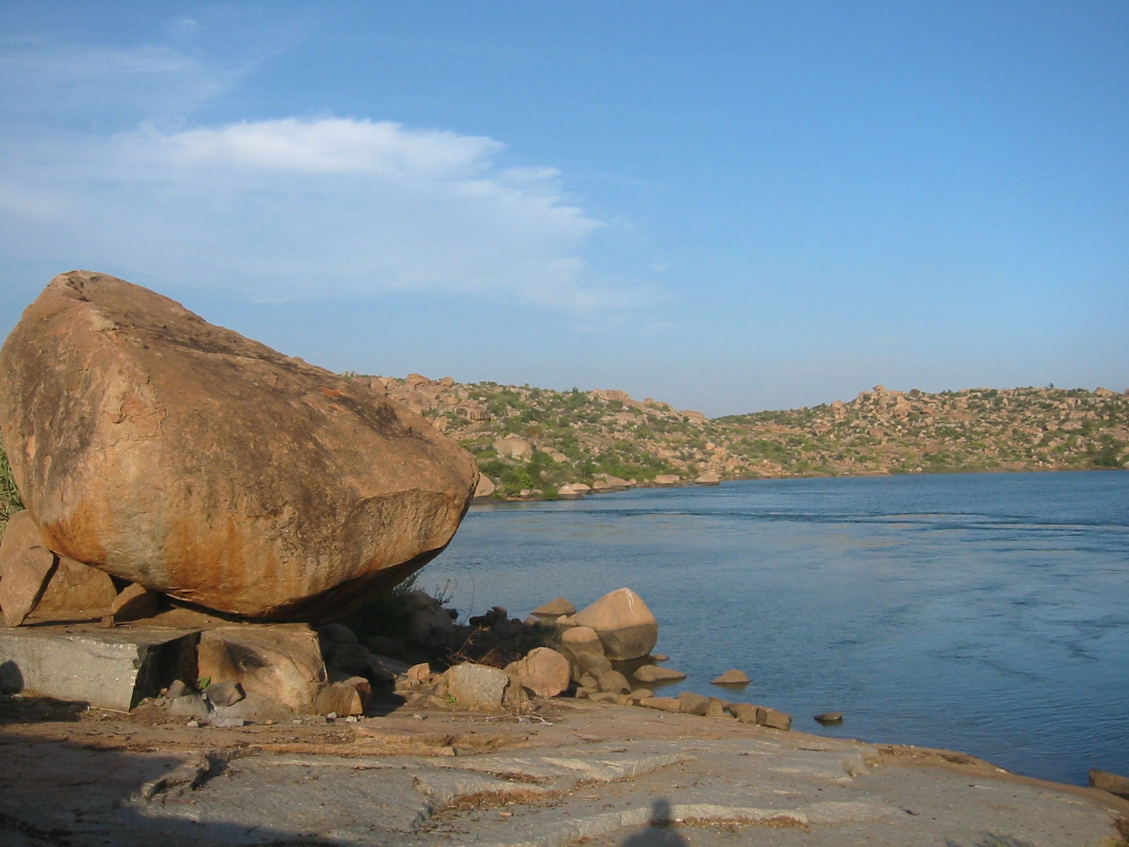 Sanapur lake, Hampi Sanapur lake, Hampi